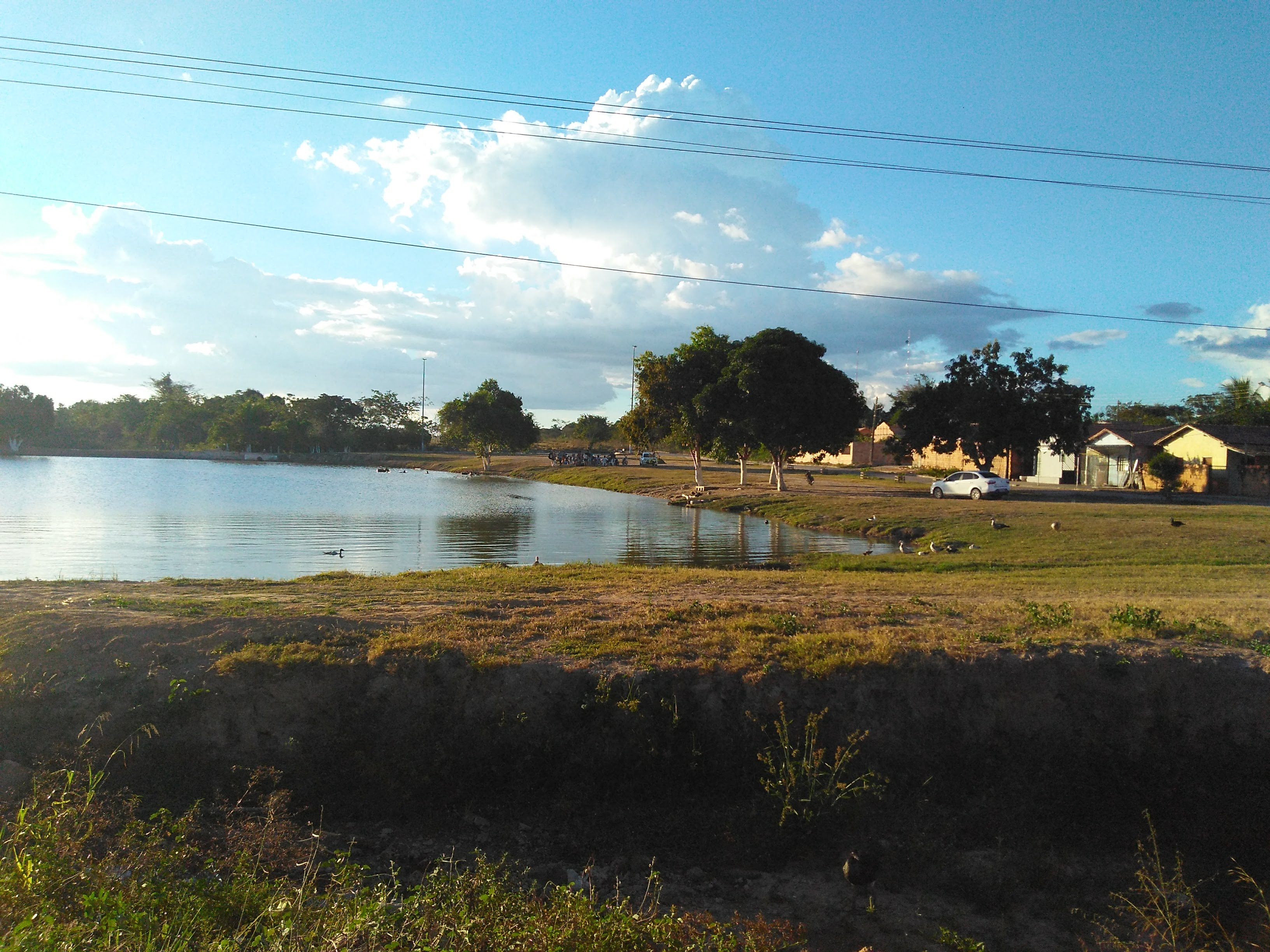 Lago Samaúma, em Bom Jesus do Tocantins (Pará). Observa-se muitos patos nas margens do lago.